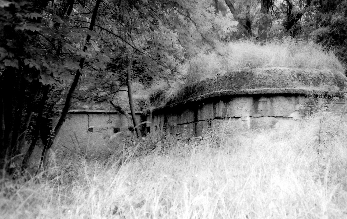 Feste Obergentringen